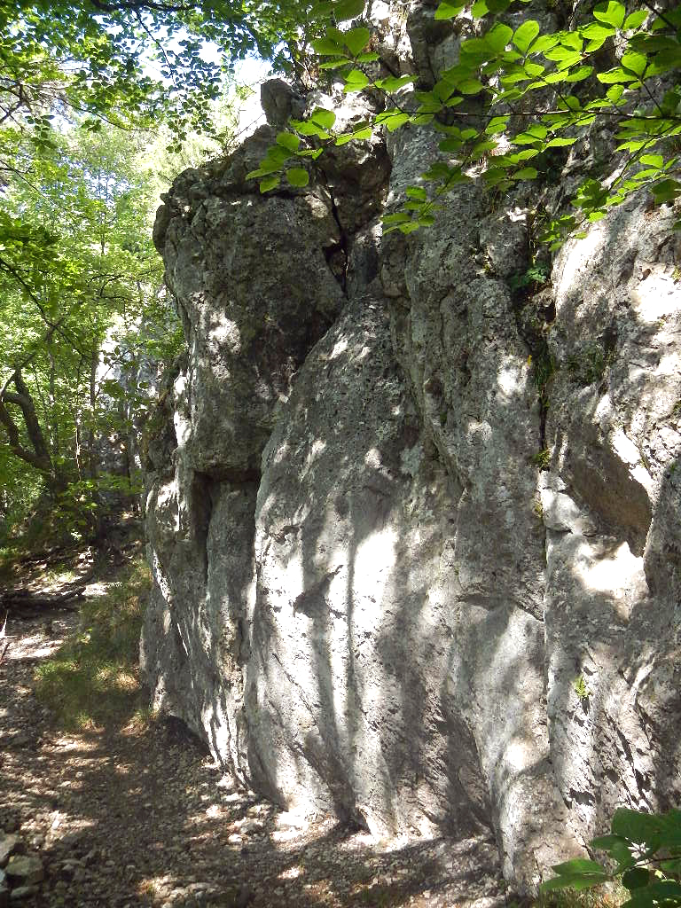 Klettergarten Gießwände in Wassergspreng (Gemeinde Hinterbrühl), Bezirk Mödling, Niederösterreich, südlich von Wien: Gelände